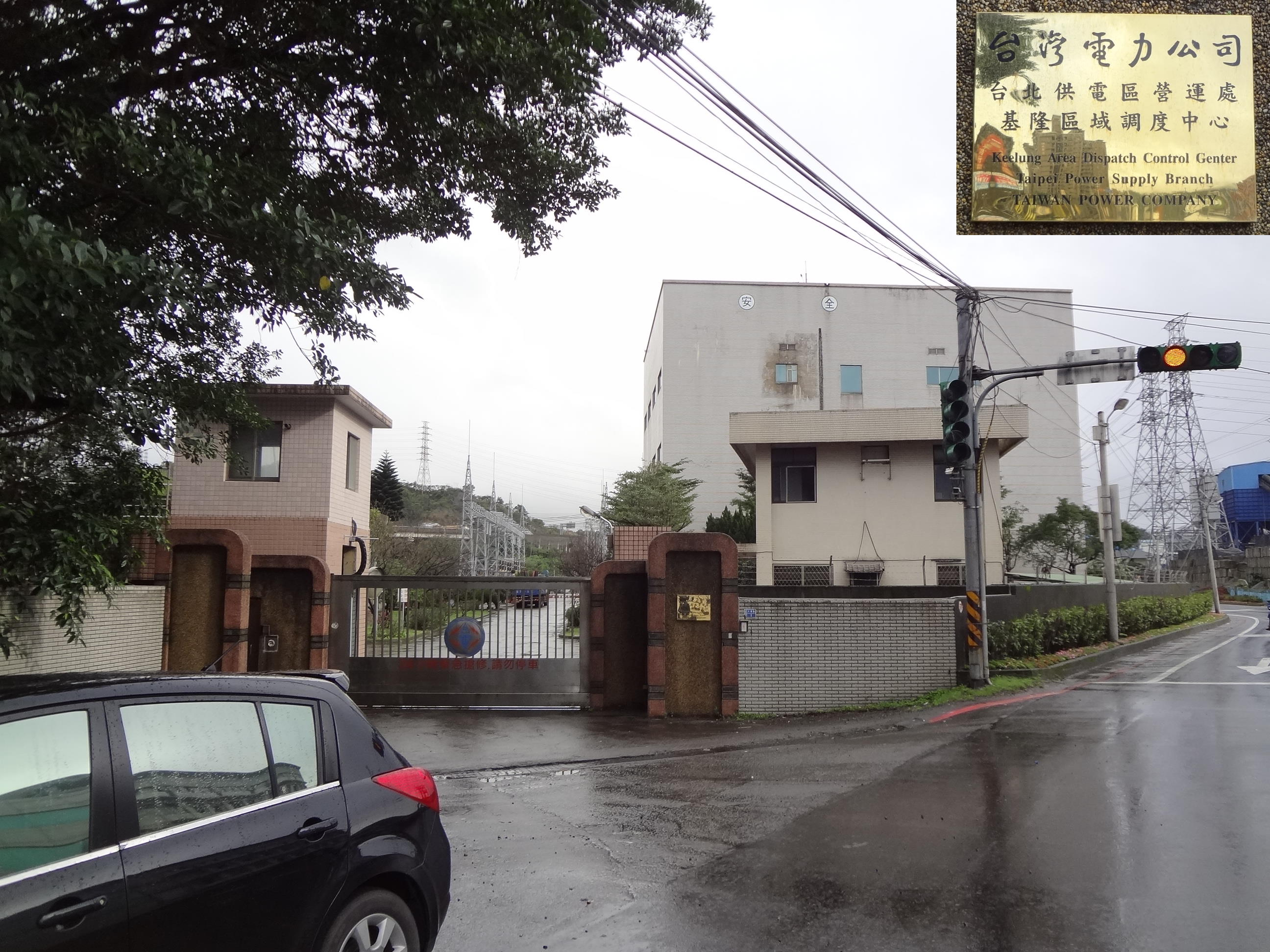 台灣電力公司台北供電區營運處基隆區域調度中心，位於基隆市七堵區八德路1號。